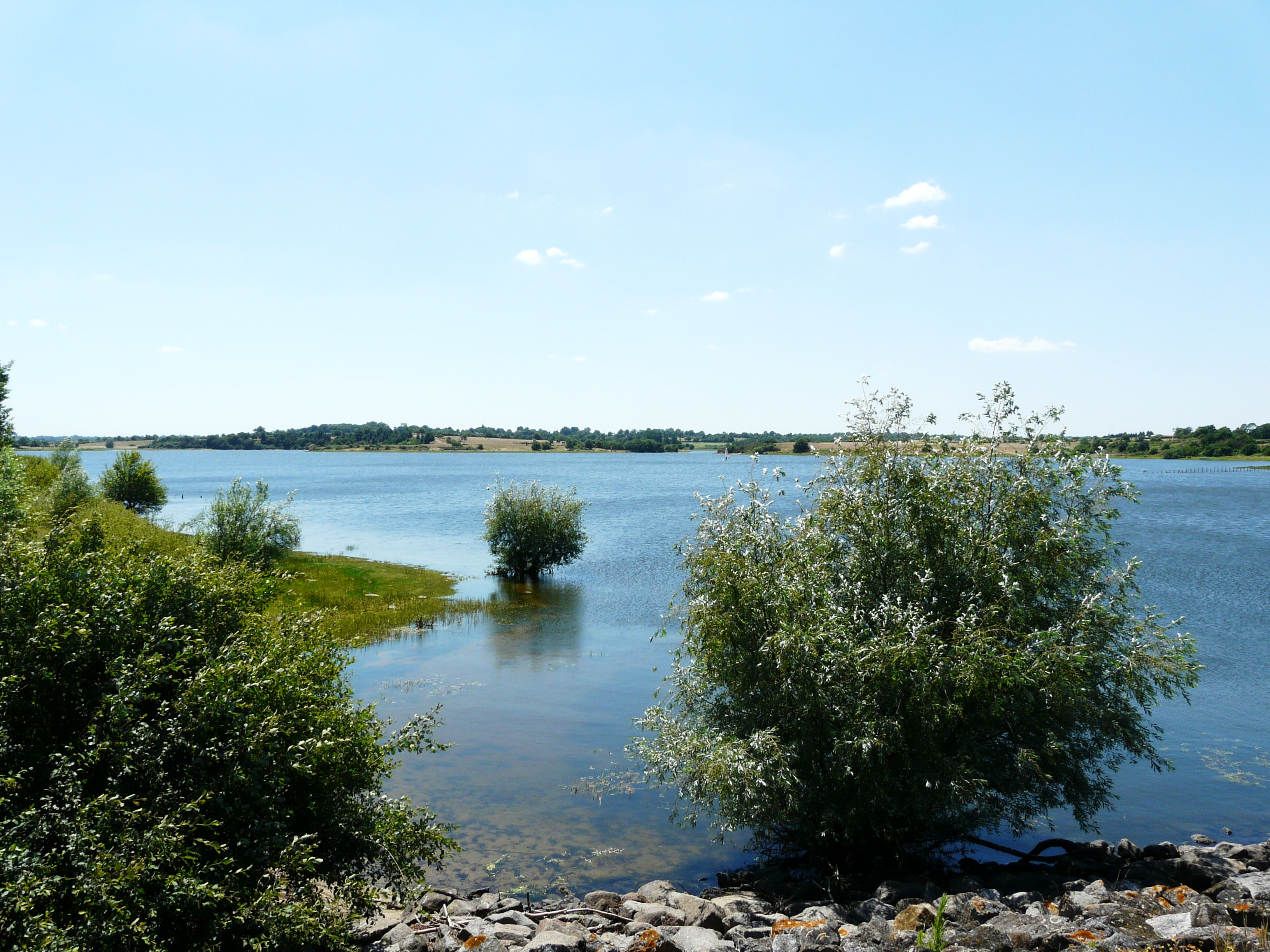 Le lac du Cébron vu depuis la digue du barrage du Cébron, communes de Gourgé et Saint-Loup-Lamairé, Deux-Sèvres, France